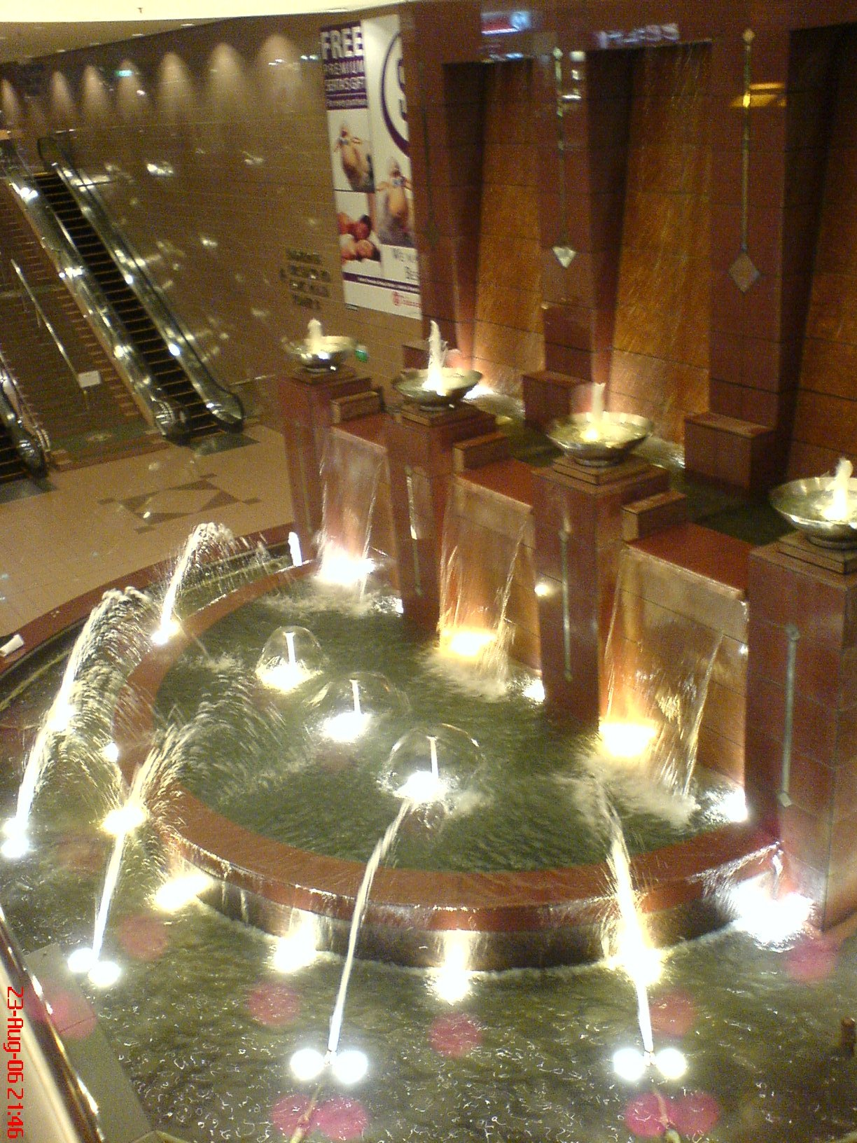 stort indendørs springvand